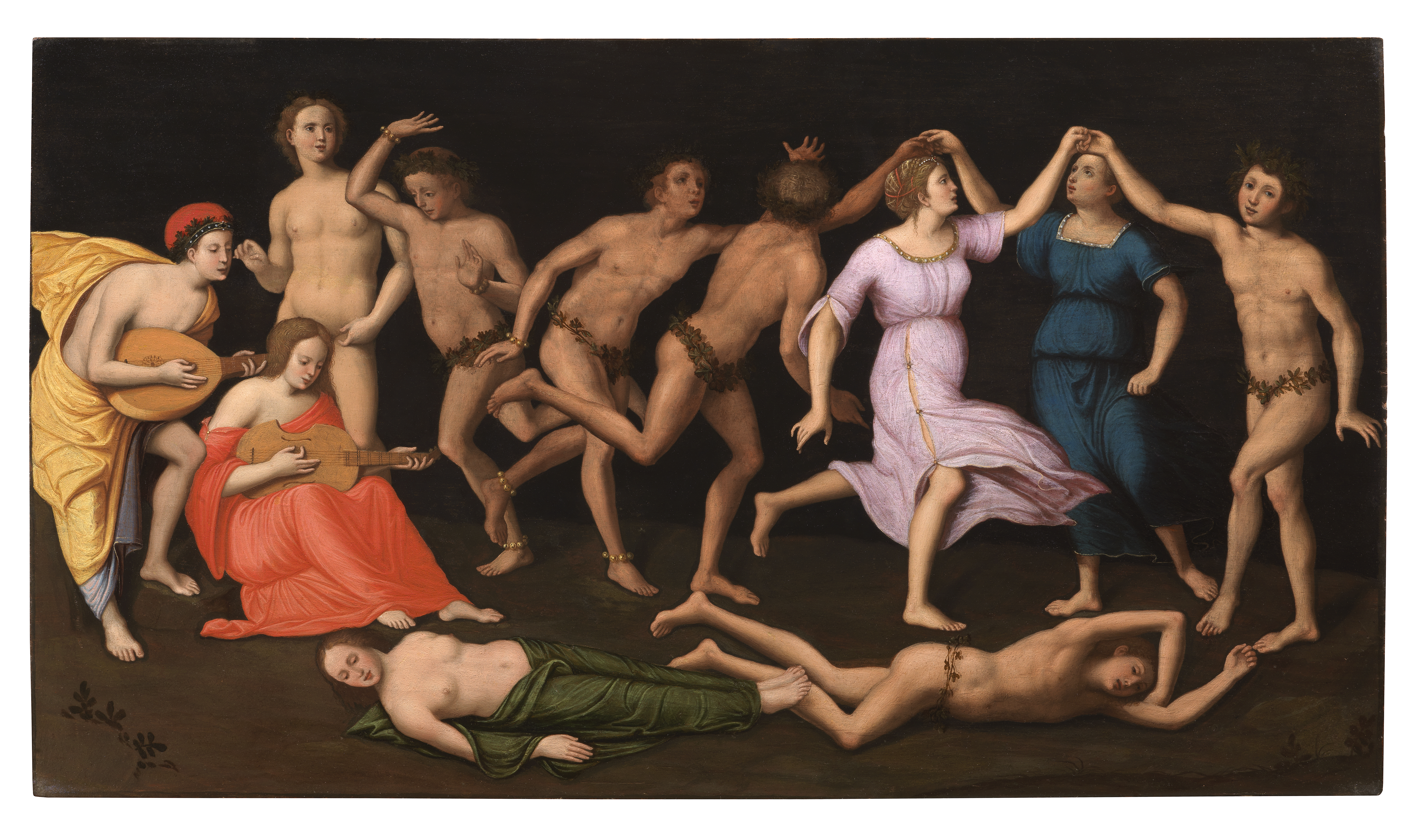 Lorenzo Leonbruno (Mantova, 1477 circa – Milano, 1533) Allegoria profana Tavola, cm 31,1 x 56